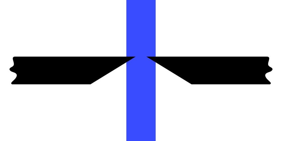 Form und gegenseitige Lage der Schneiden beim Seitenschneider